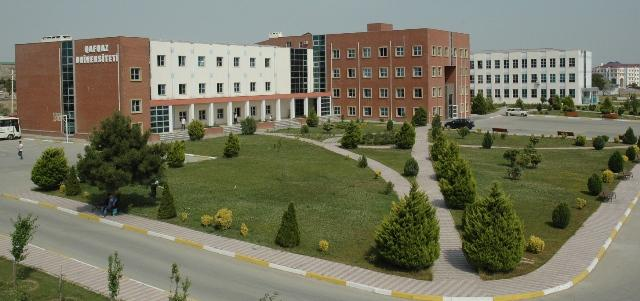 Təhsil müəssisəsi